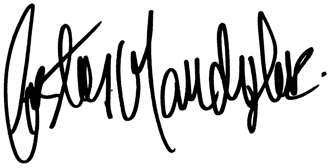 Firma de Costas Mandylor